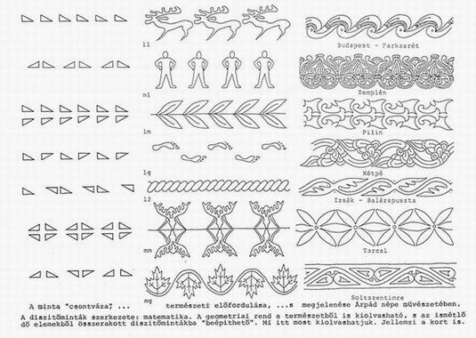 Honfoglalás kori díszítősortípusok